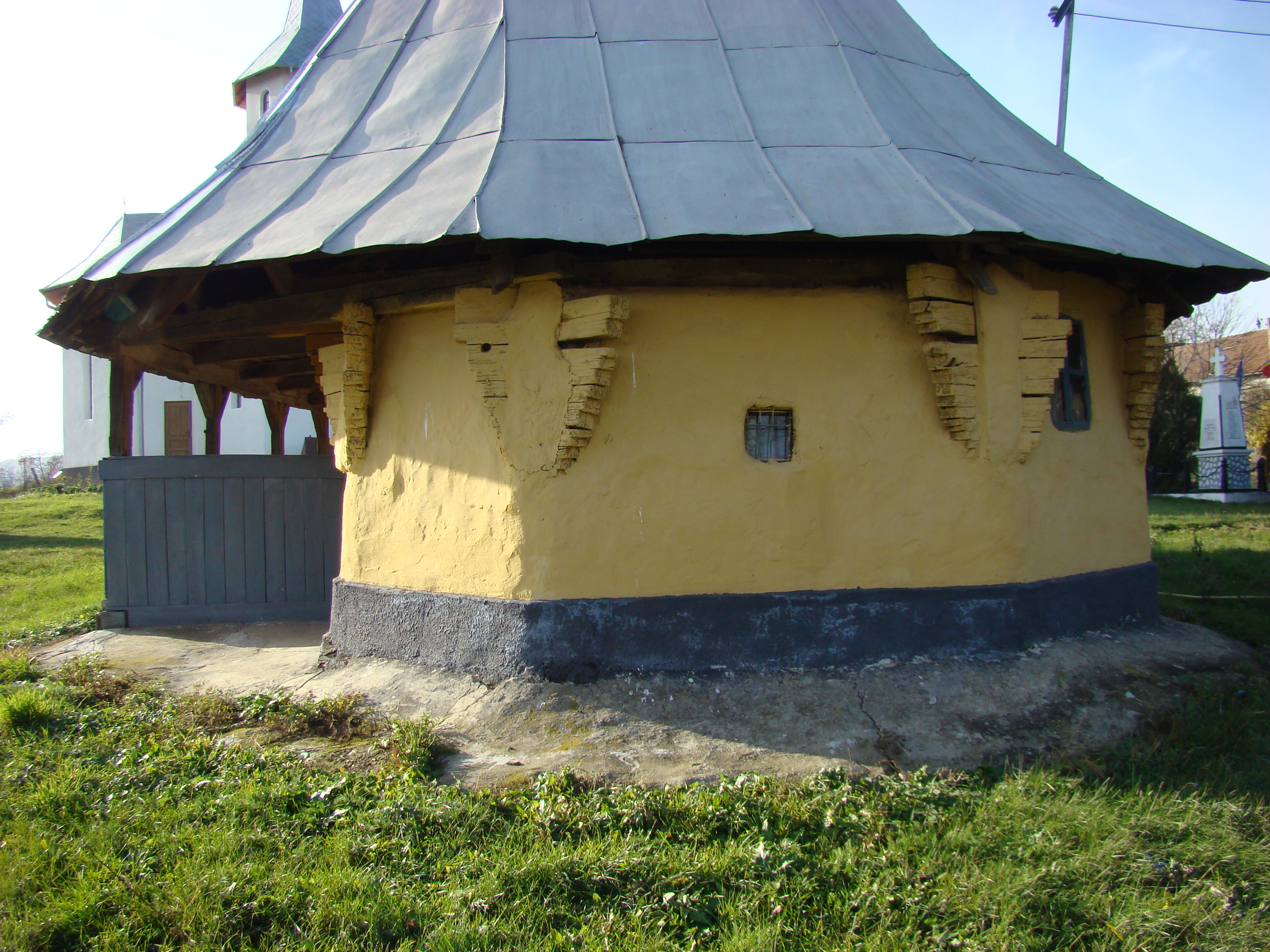 Biserica de lemn "Sf. Arhangheli Mihail şi Gavriil" , sat BERCHIEŞU; comuna FRATA